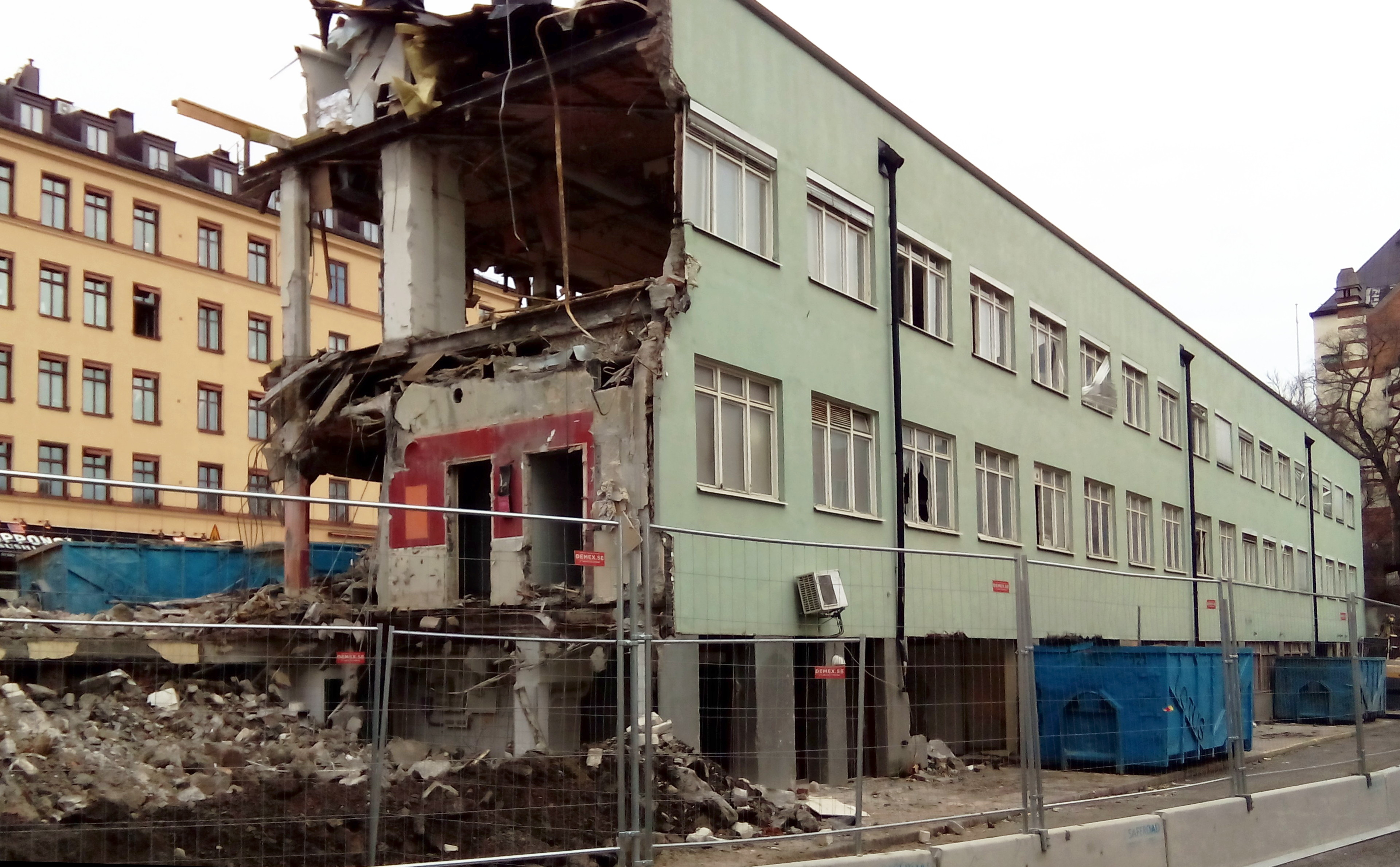 Basaren medan den rivs.